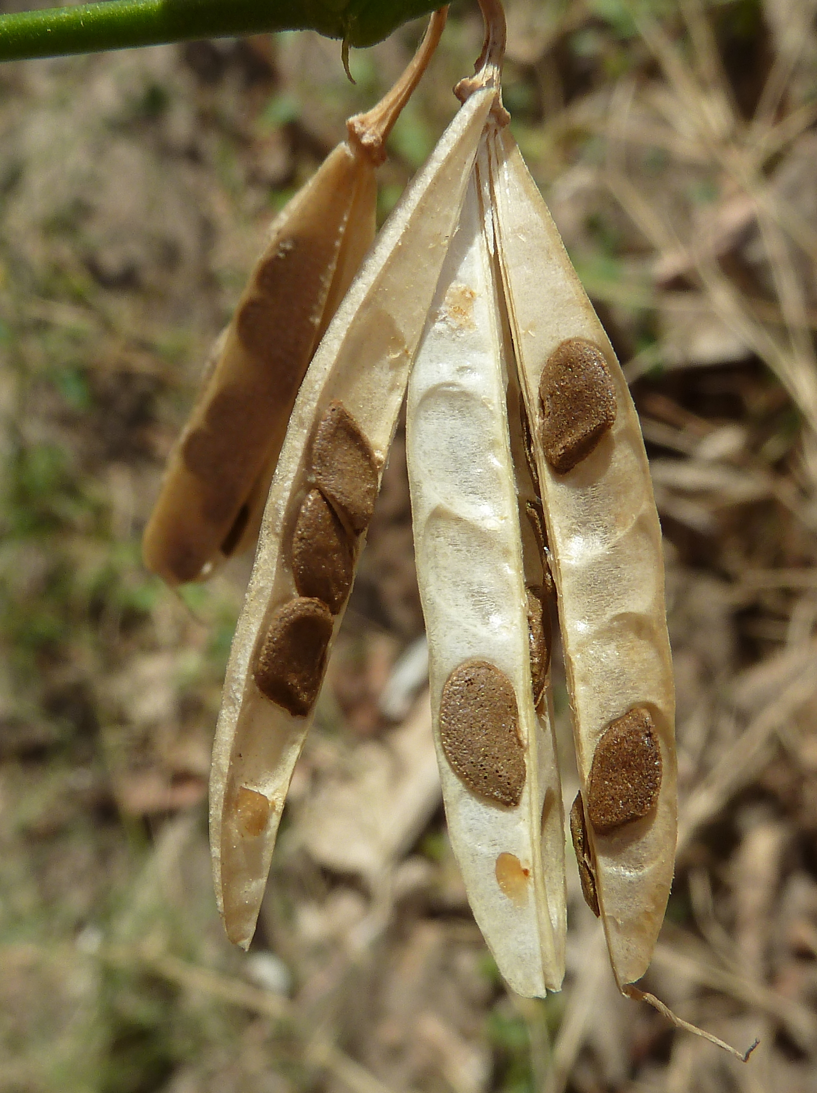 Zygophyllum fabago (Morsana) : Frutos maduros abiertos in situ, con semillas - Rambla del Charco, Águilas (Murcia, España).